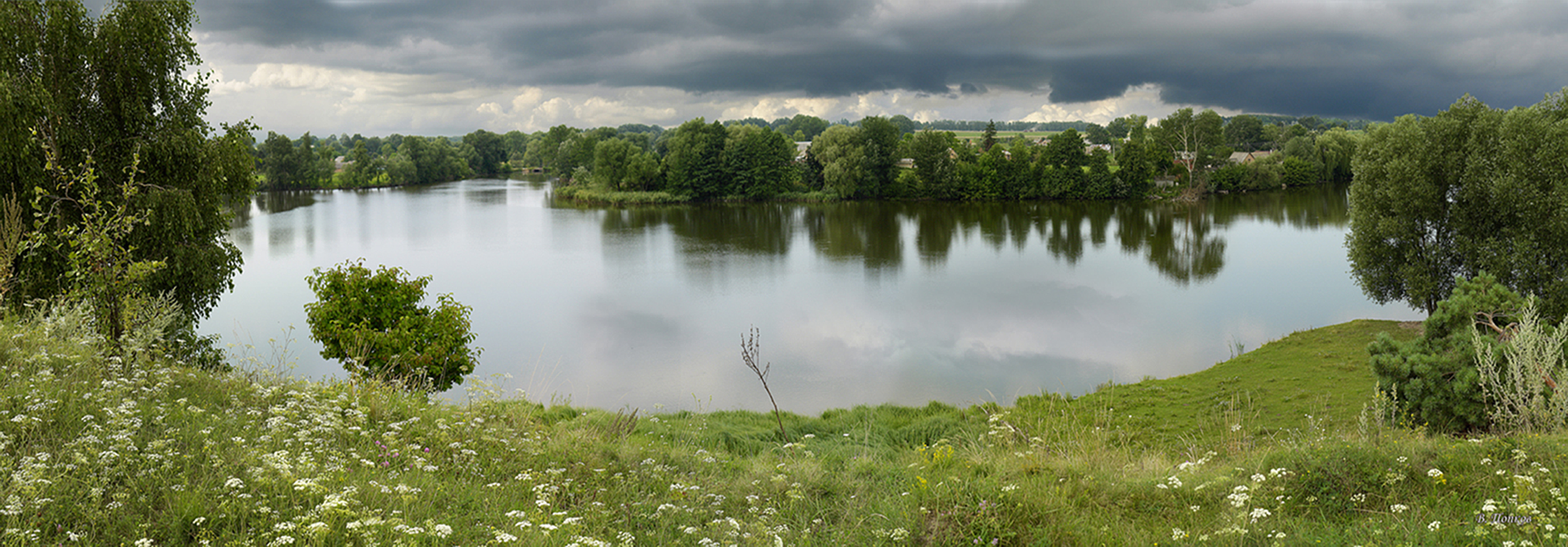 «Кашперівський парк», Козятинський район, с. Кашперівка